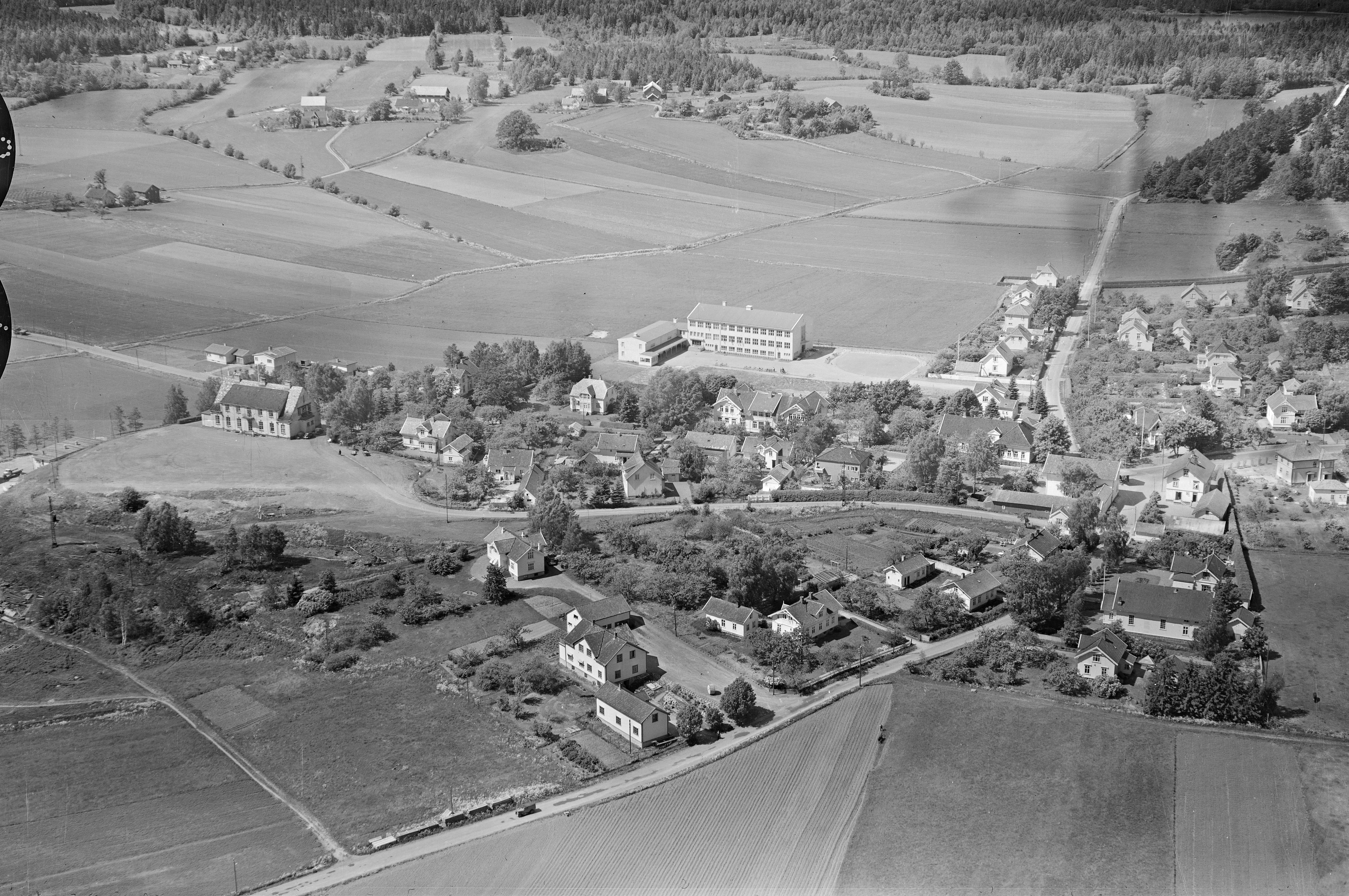 WF.S.32495